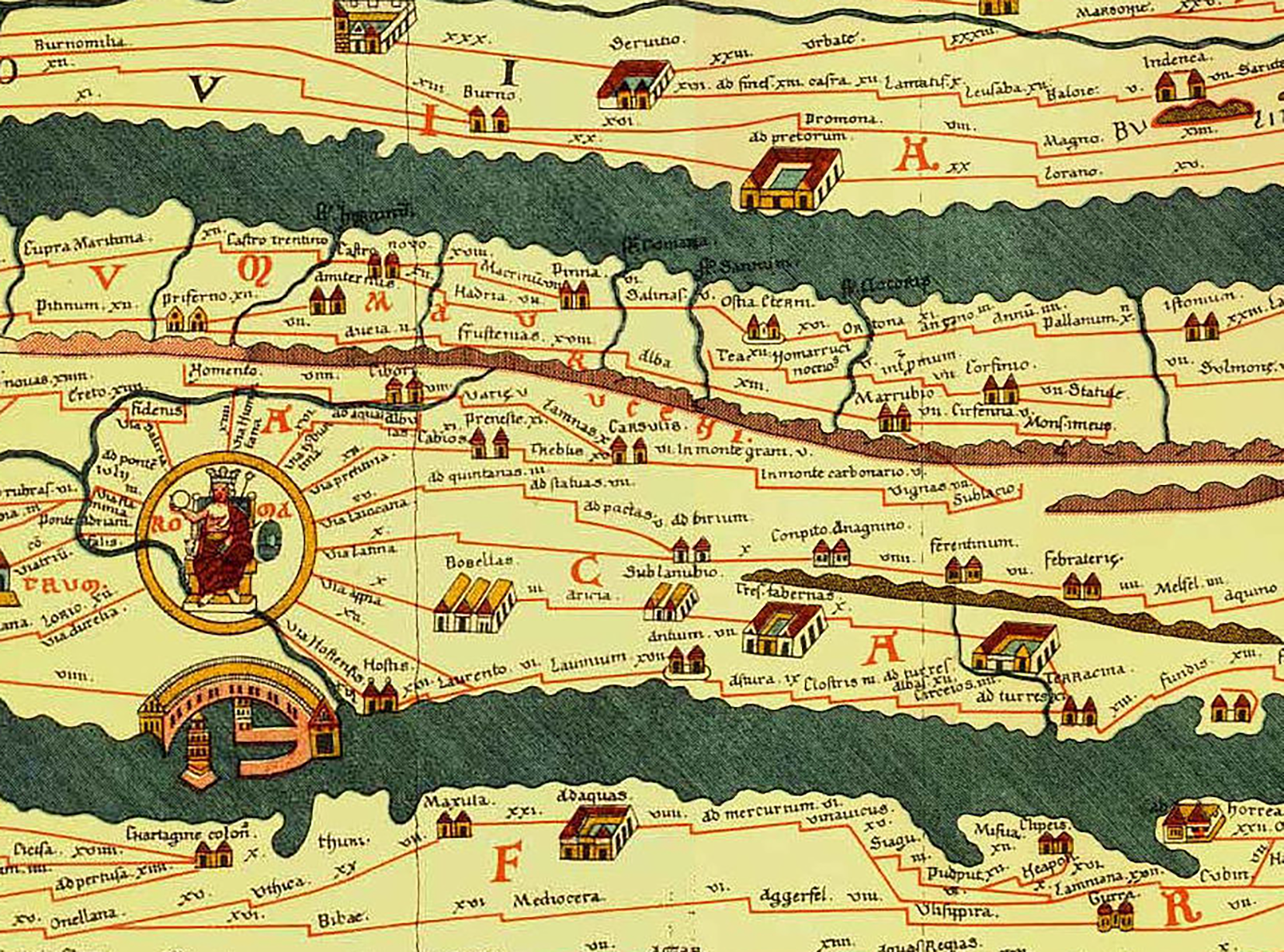 Sezione della Tabula peutingeriana delle regioni Lazio e Abruzzo, dalla riproduzione del 1887 di Konrad Miller